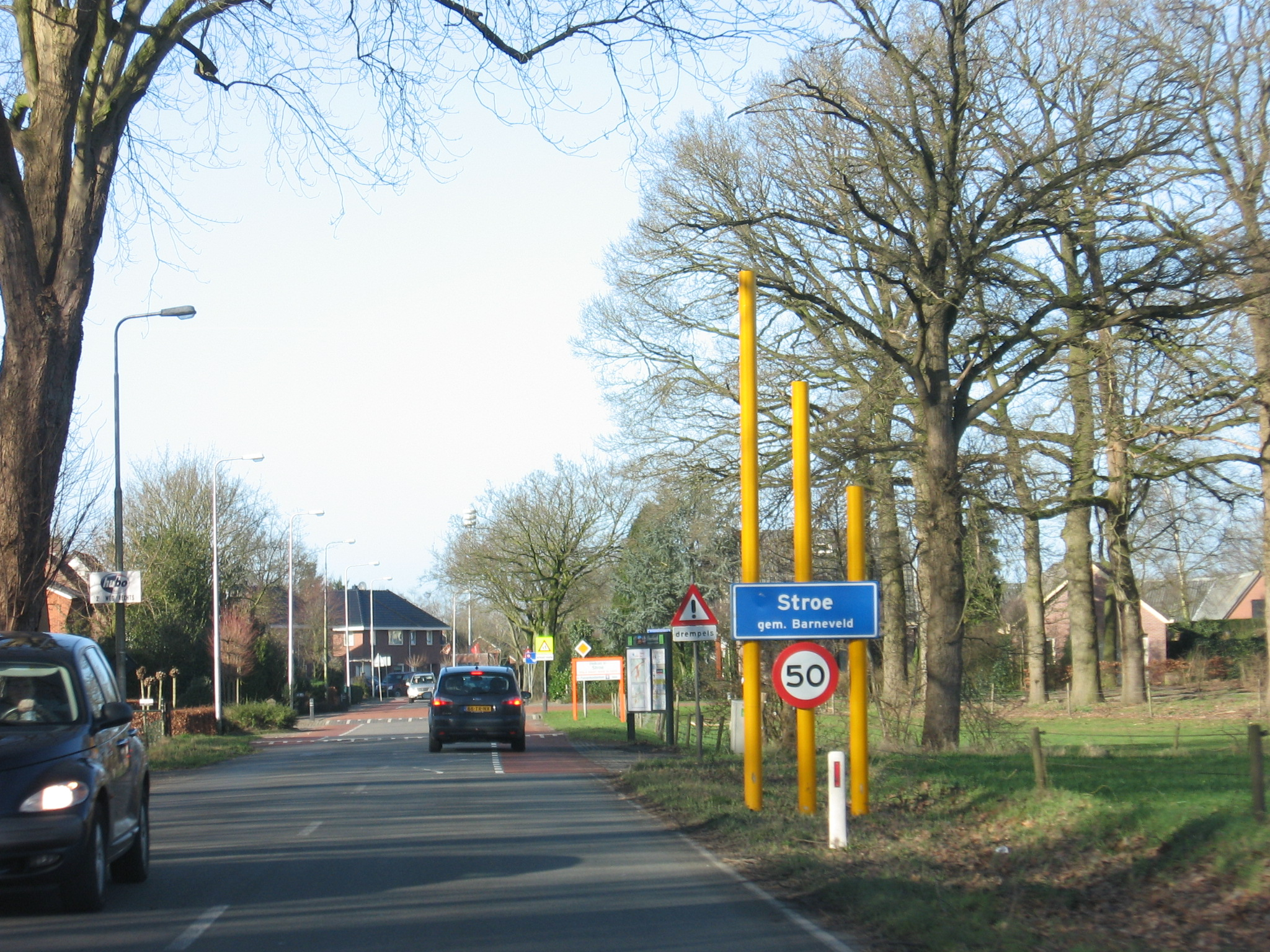 Stoe, gemeente Barneveld